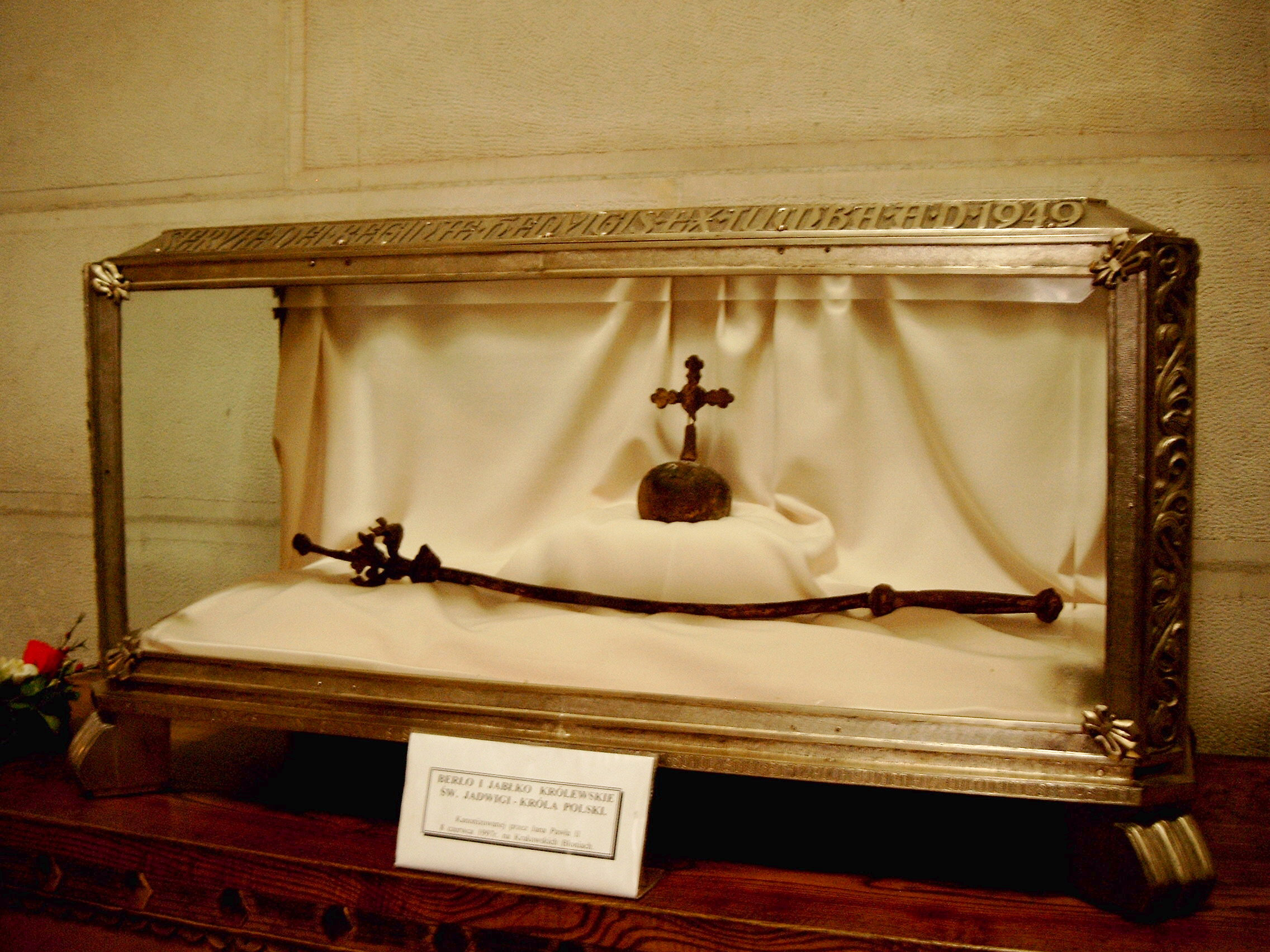 Insygnia królowej Jadwigi, znajdujące się w katedrze na Wawelu, Kraków